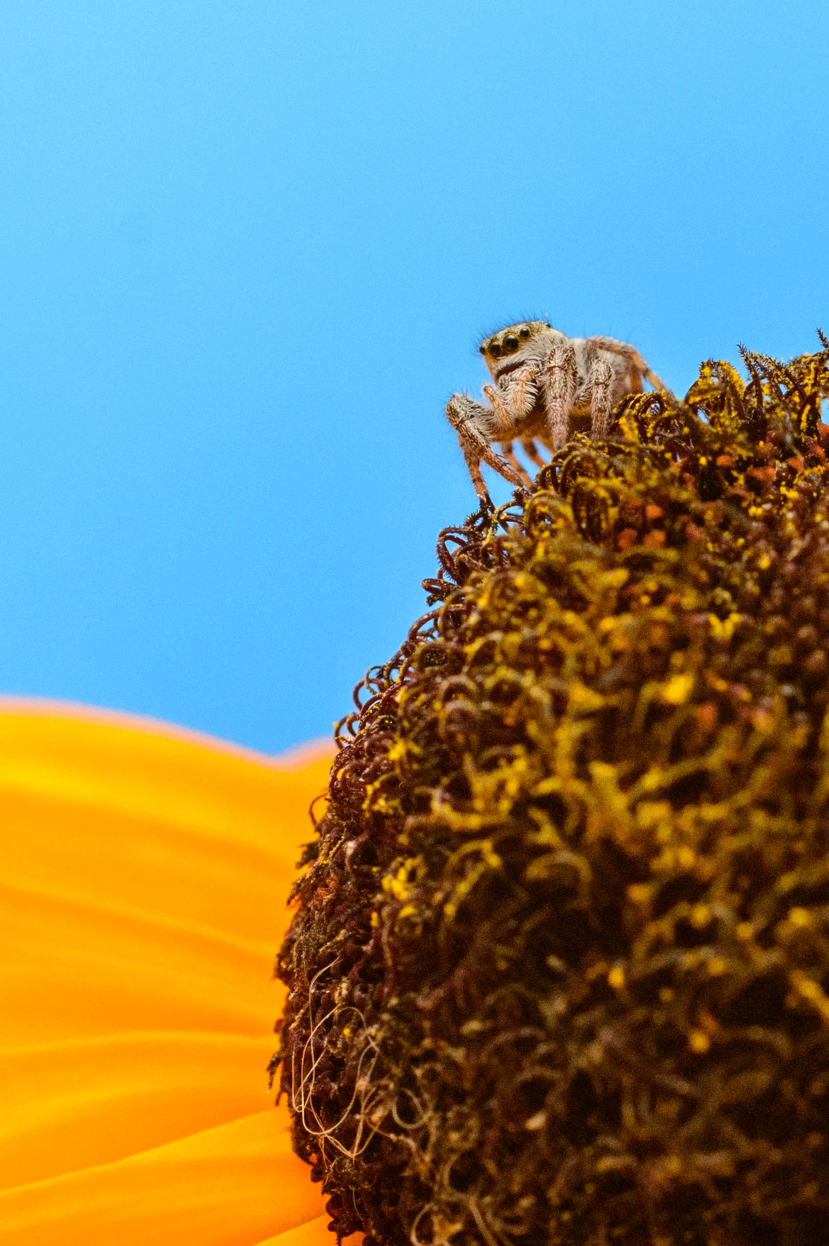 Битва за Москву. В засаде